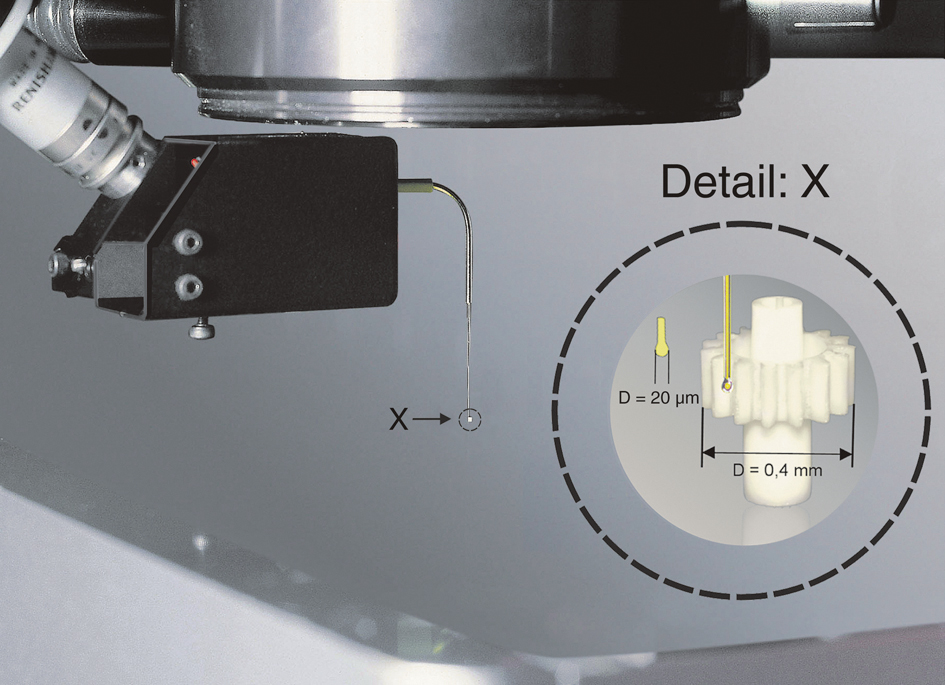 Hochgenauer Mikrotaster